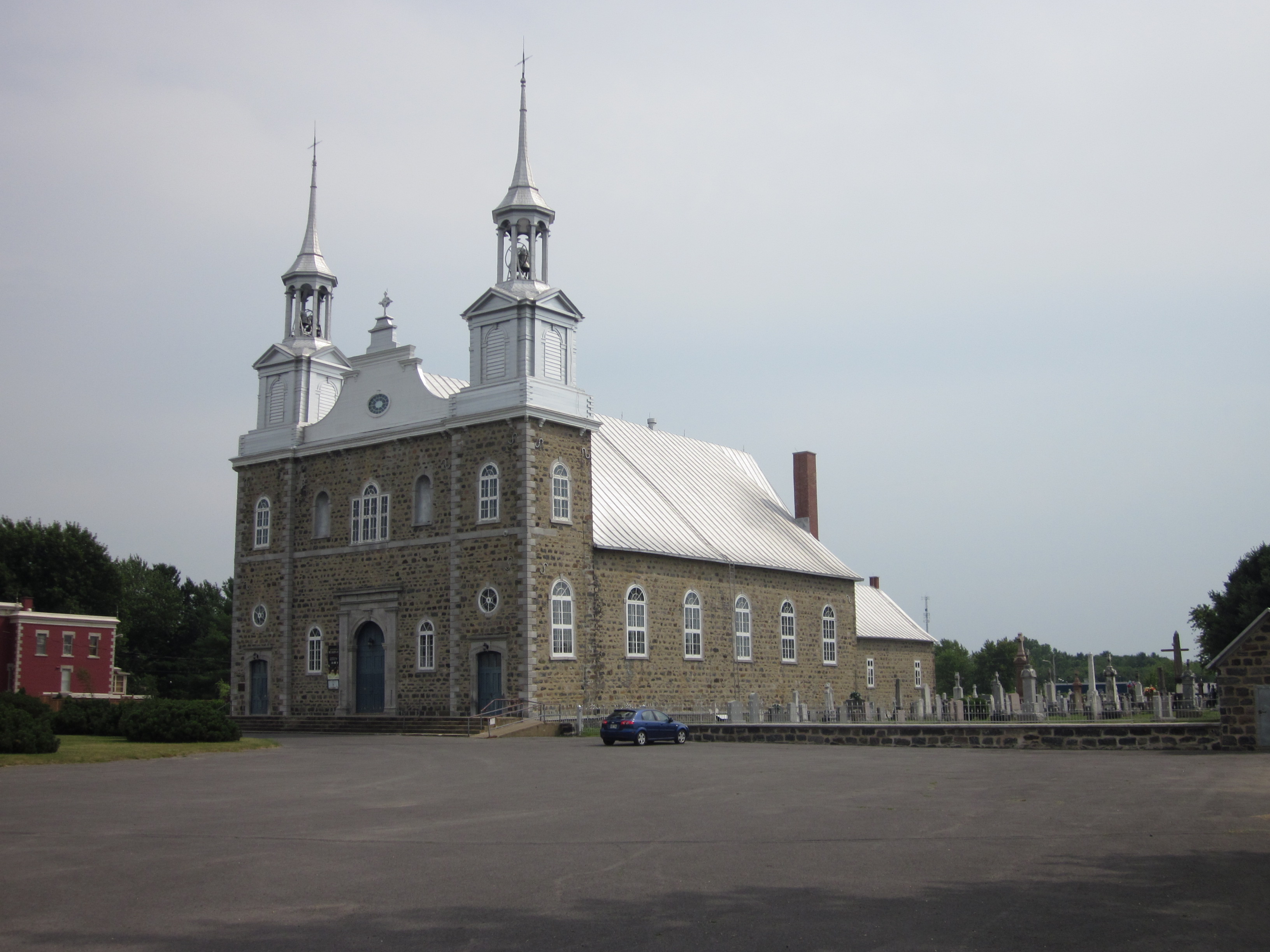 L'Église Saint-François-Xavier de Saint-François-du-Lac a été construite en 1849. Elle a été classée monument historique en 1957